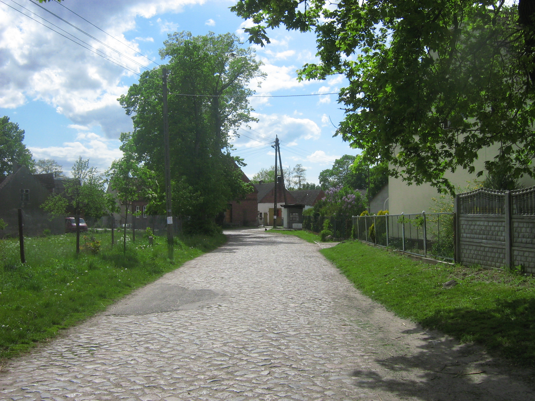 Droga w Kukułowie